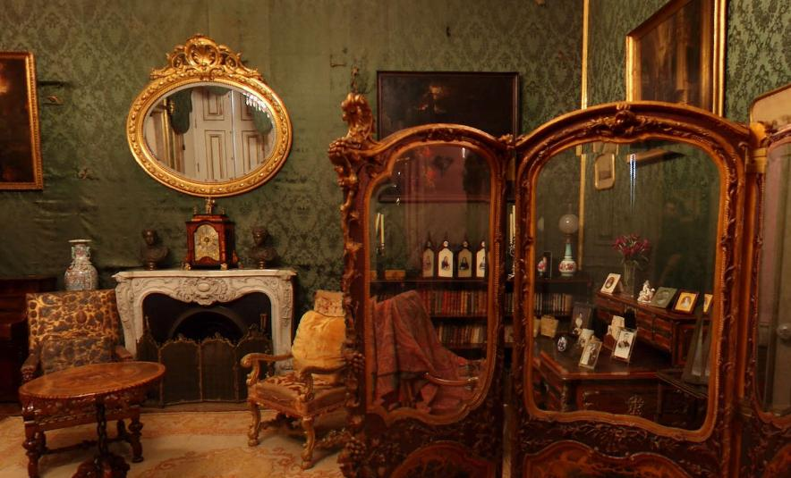 Sala Verde do Palácio Nacional da Ajuda